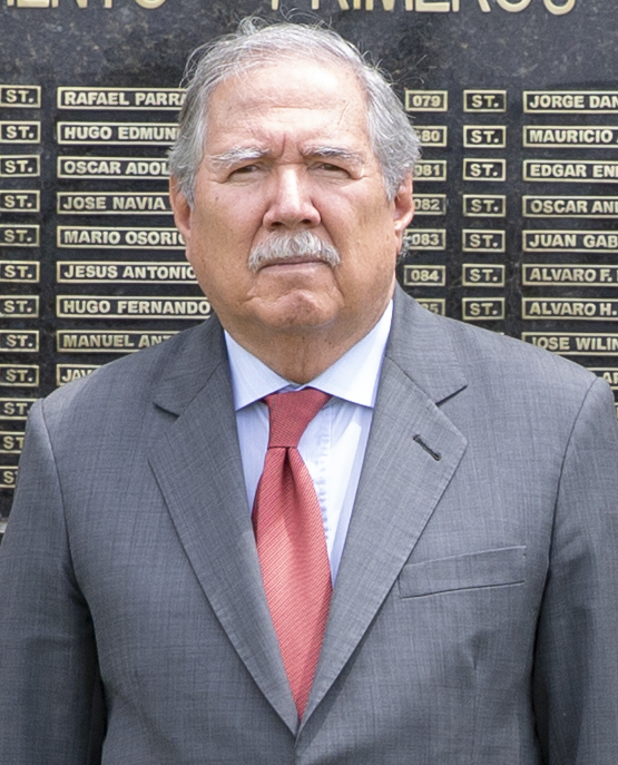 Guillermo Botero Nieto, Ministro de Defensa Nacional de Colombia